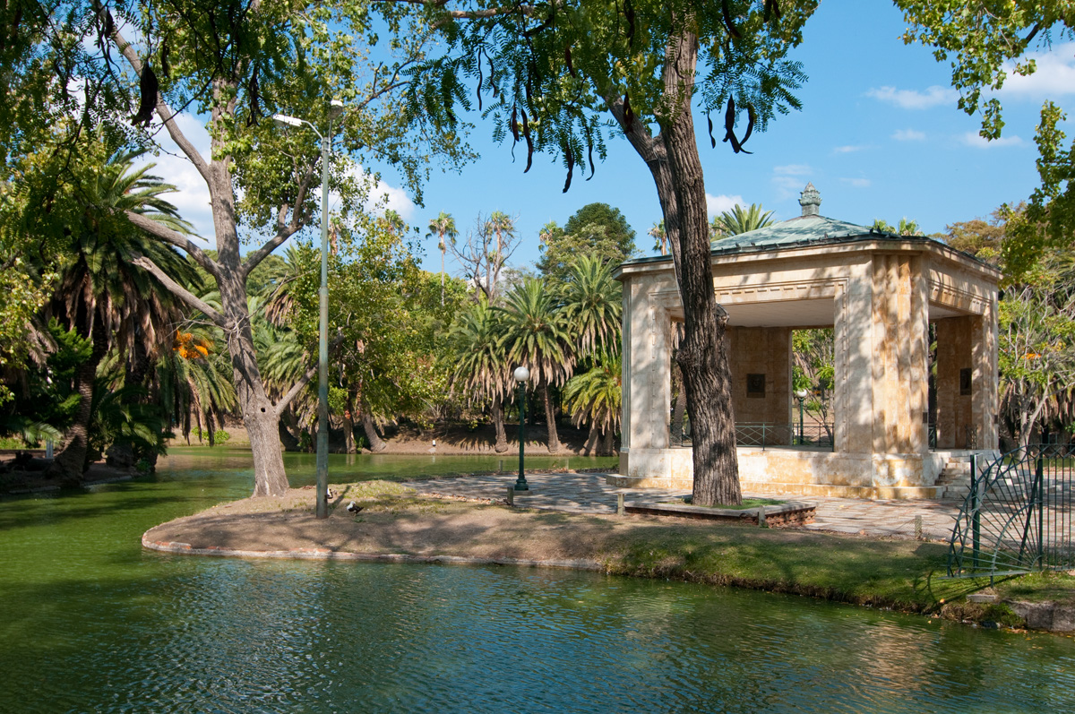 Parque José Enrique Rodó - ex Parque Urbano. Ubicada en el departamento de Montevideo